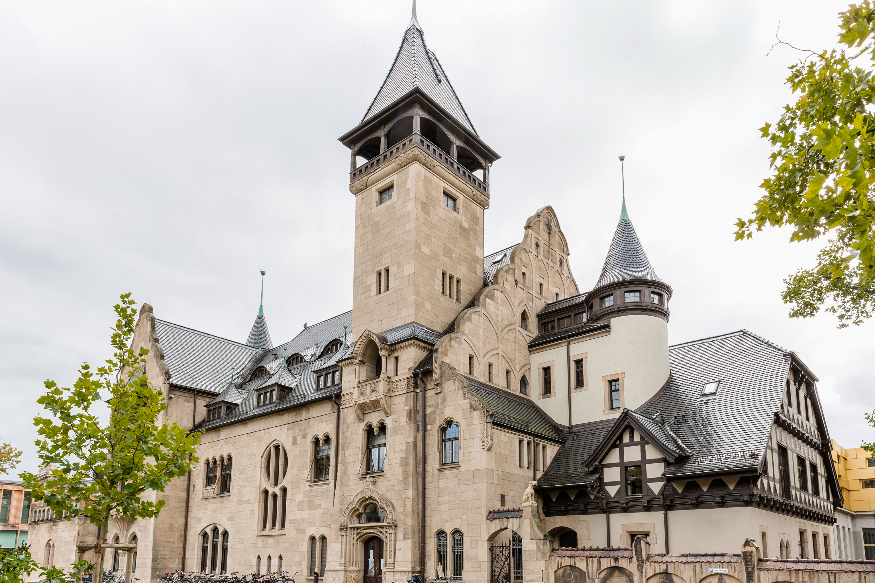 Zentrale Verwaltung der Burg Giebichenstein Kunsthochschule Halle in der 1901 für den Bankier Emil Steckner erbauten Villa am Neuwerk 7.